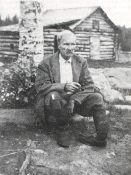 Juho Vihtori Nätti alias ”Nätti-Jussi” kampurajalkansa kanssa.